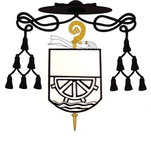 Wappen Nikolaus III. Mölitor, 1600 - 1640, Abt von Münsterschwarzach (1640-1640)